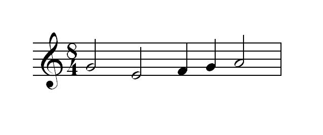 Näide reeglile, mis keelab paigutada kahte veerandnooti kahe rõhulise poolnoodi vahele (isoleeritus). Näite aluseks on Knud Jeppeseni raamatu "Kontrapunkt" (Leipzig 1956) lk 113. Kasutatud on programme Finale 2005 ja MS Paint.